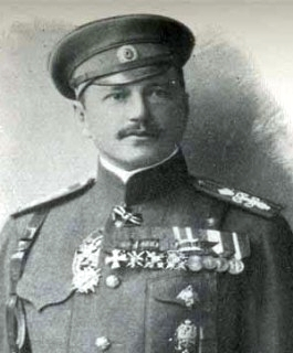 Бискупский, Василий Викторович (27 июля [9 августа] 1878 — 18 июня 1945) — русский генерал от кавалерии, придерживавшийся легитимистских взглядов.